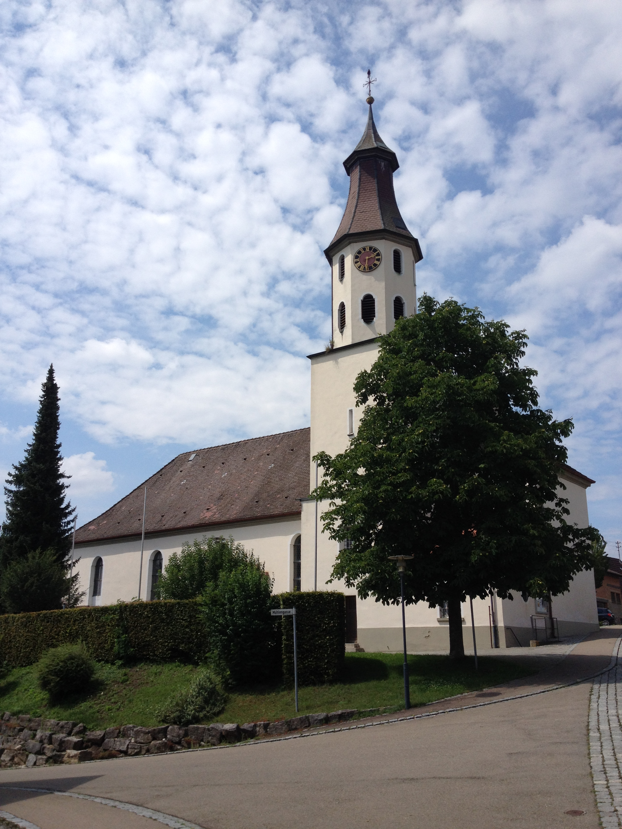 Katholische Pfarrkirche St. Johannes im Meßkircher Stadtteil Menningen